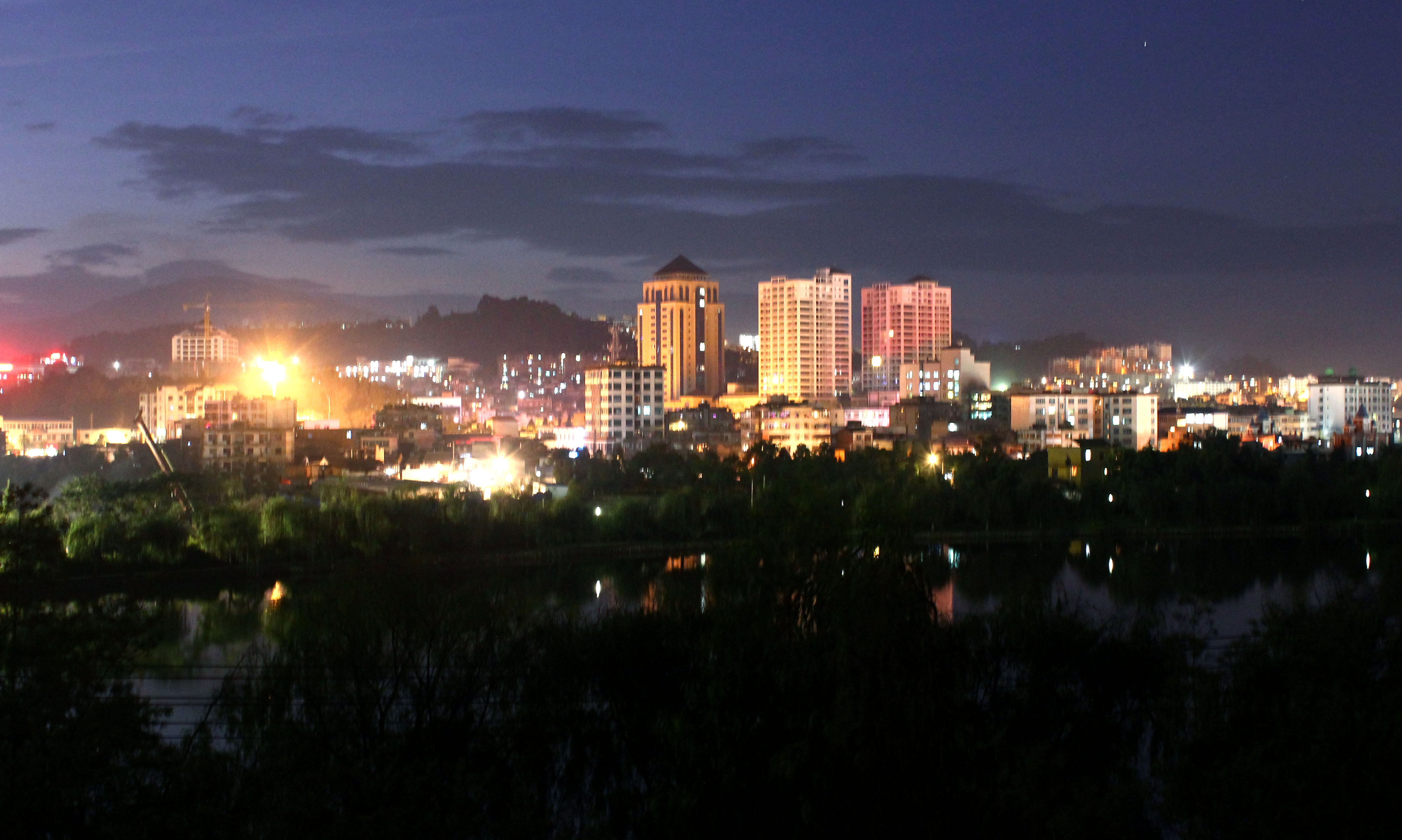 安宁市夜景，拍摄于螳螂川大桥